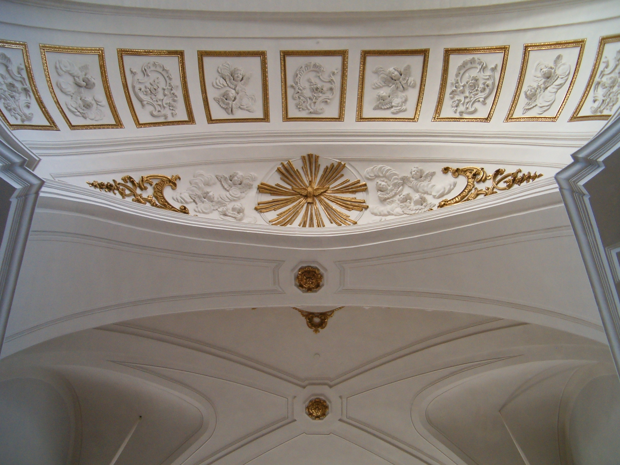 Arc Munet, Eglise Saint-Bruno des Chartreux, Lyon, France